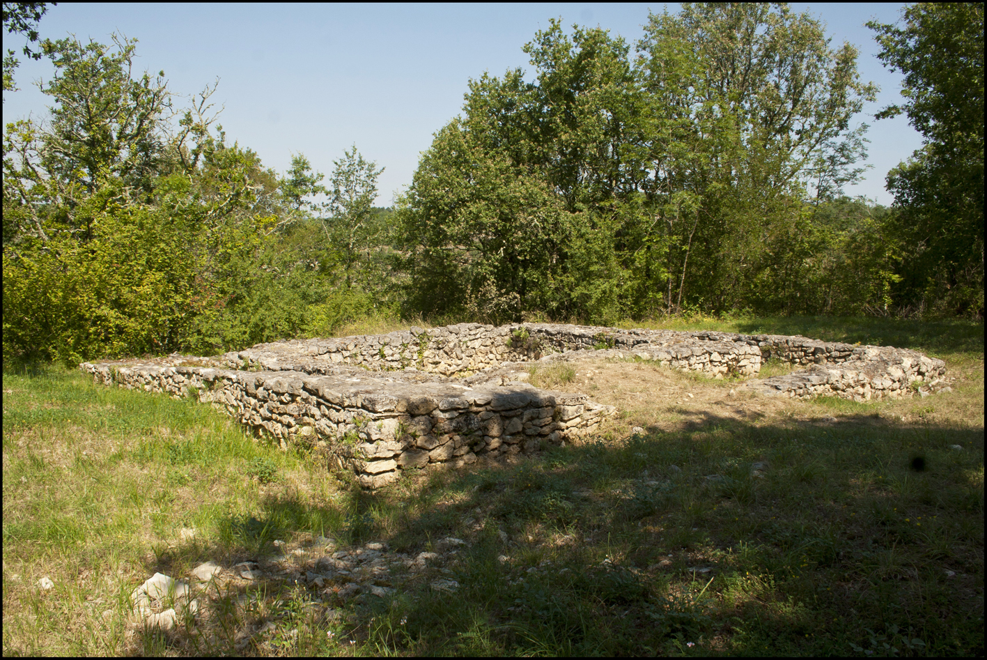 Ruine d'un temple gallo-romain sur l'oppidum de l'Impernal à Luzech .